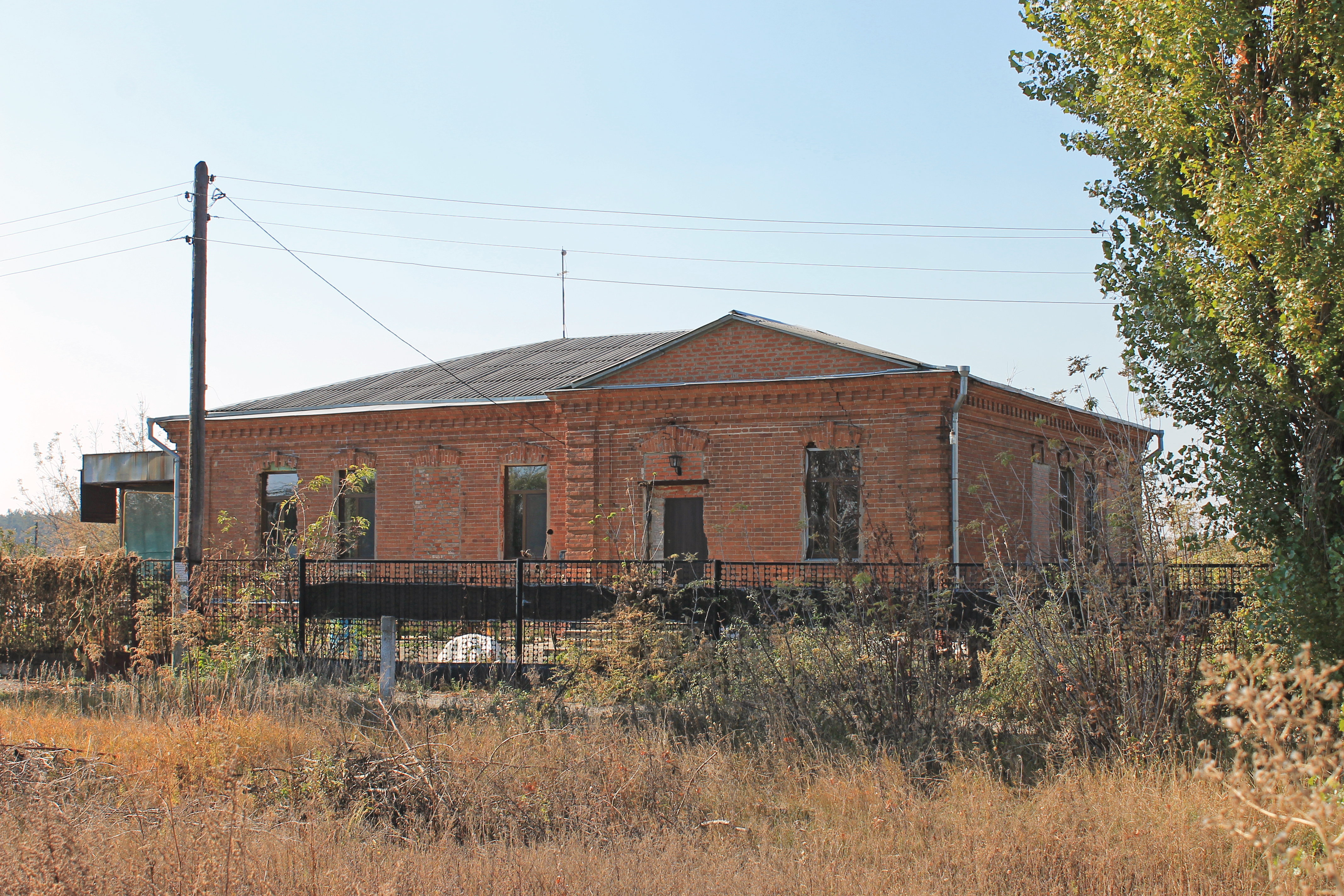 Садибний будинок кінця 19ст., с.Руські Тишки, Харківський р-н., Харківська обл.